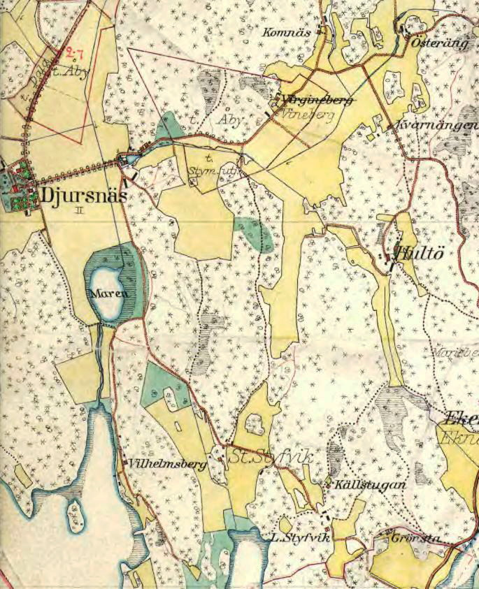 Djursnäs gård och sjön Maren